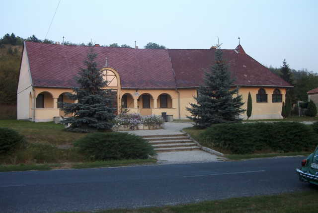 Sokorópátkai községháza